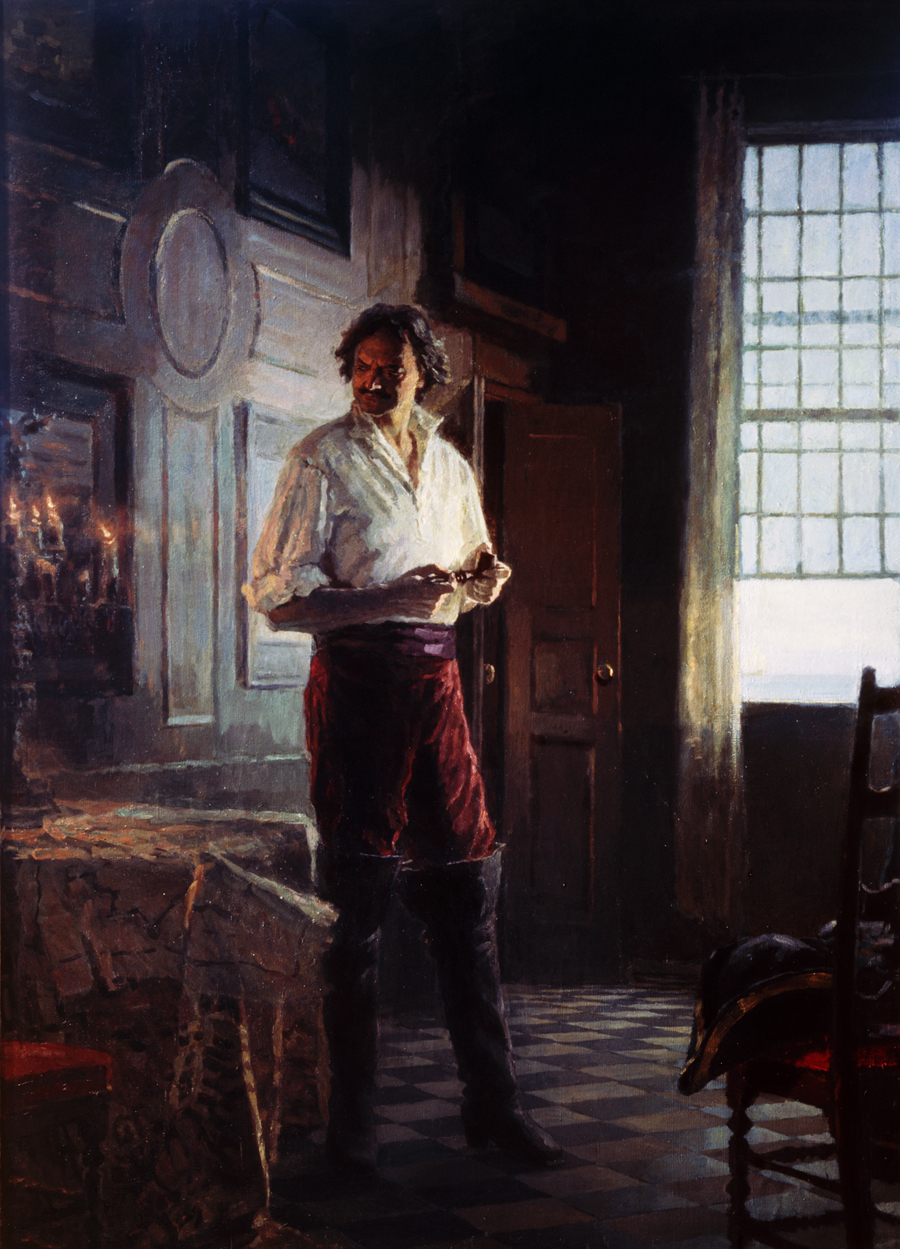 Сергей Кириллов. «Петр Великий». 1982-1984. Х.м. 235x170